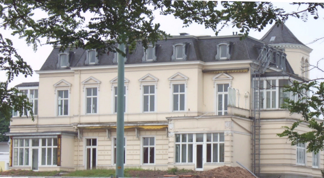 Villa Dahm in Bonn